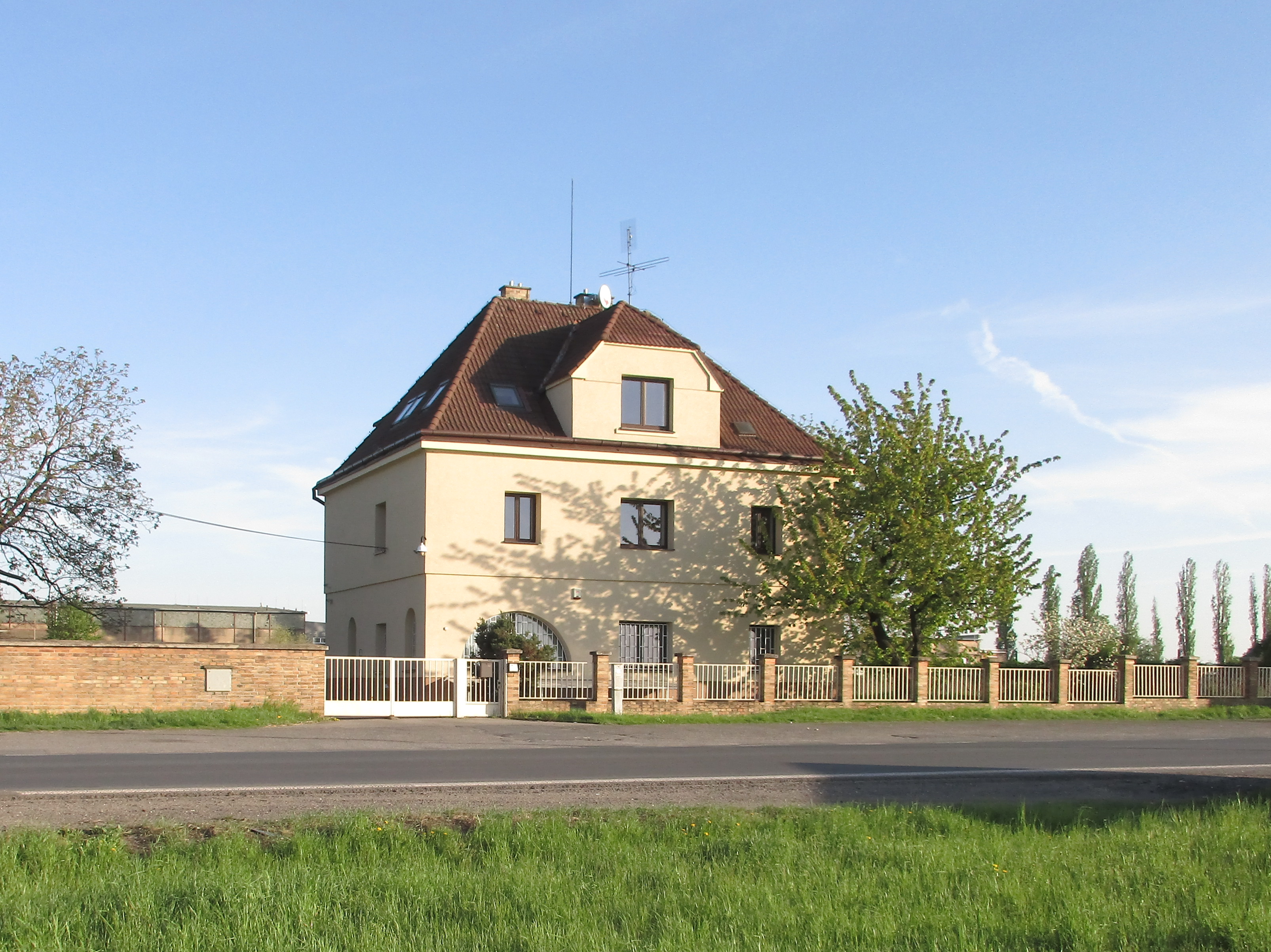 Praha 9-Kbely, Mladoboleslavská 301/10. Budova bývalého akcízu.